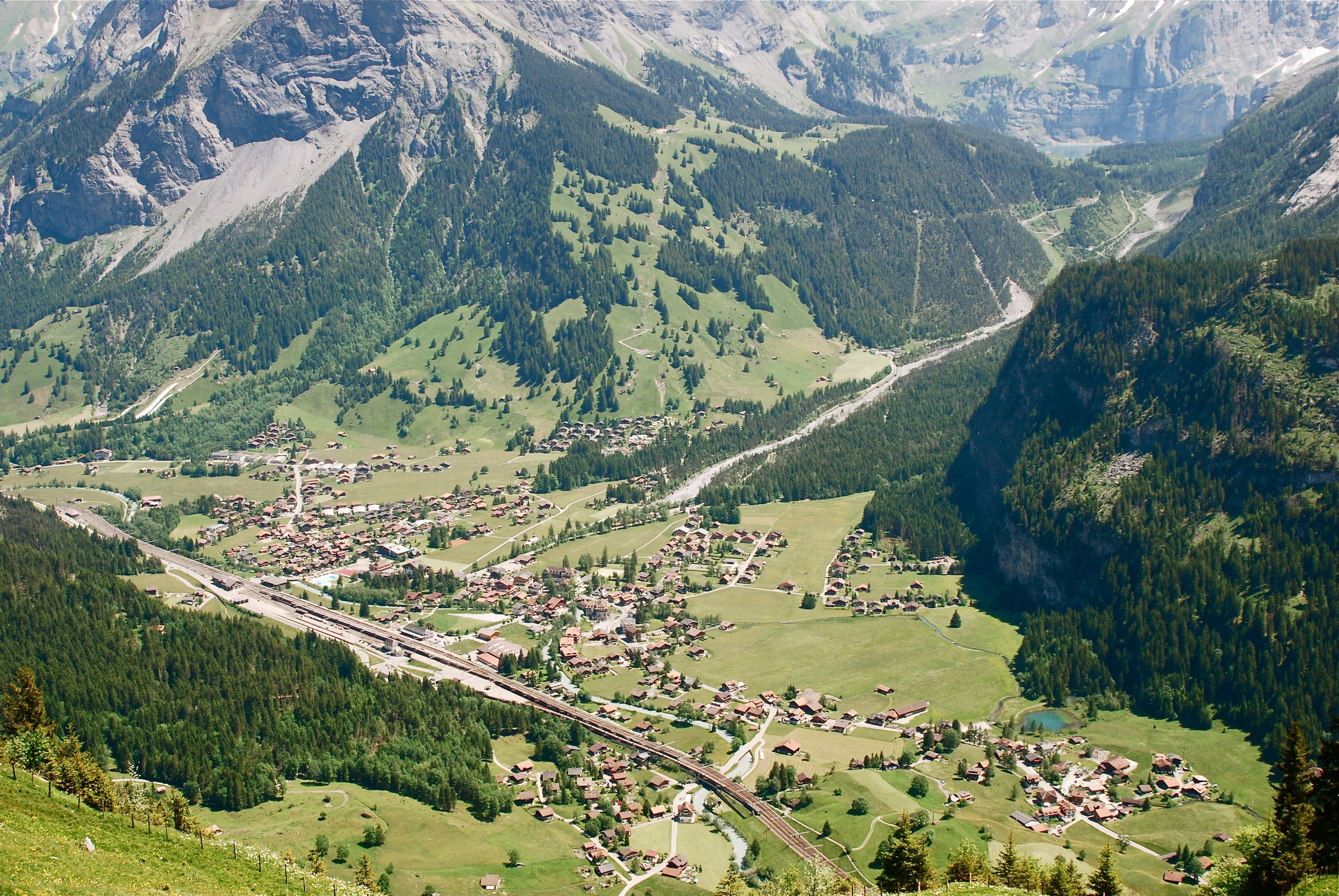 Kandersteg_Allmenalp tou Oeschienensee